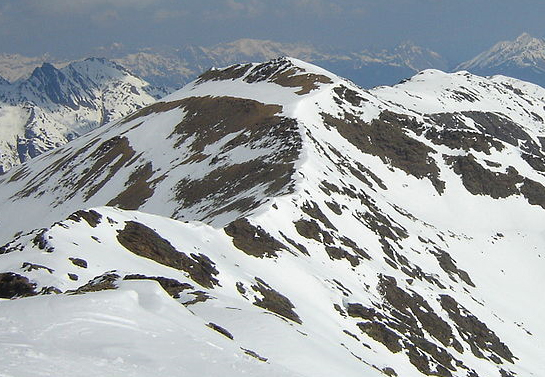 Blick vom Roten Kogel nach Norden: Auf Sömen, 2798m